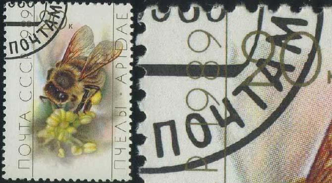 Почтовая марка СССР №6071 ЦФА (гашение в типографии) + увеличенный фрагмент